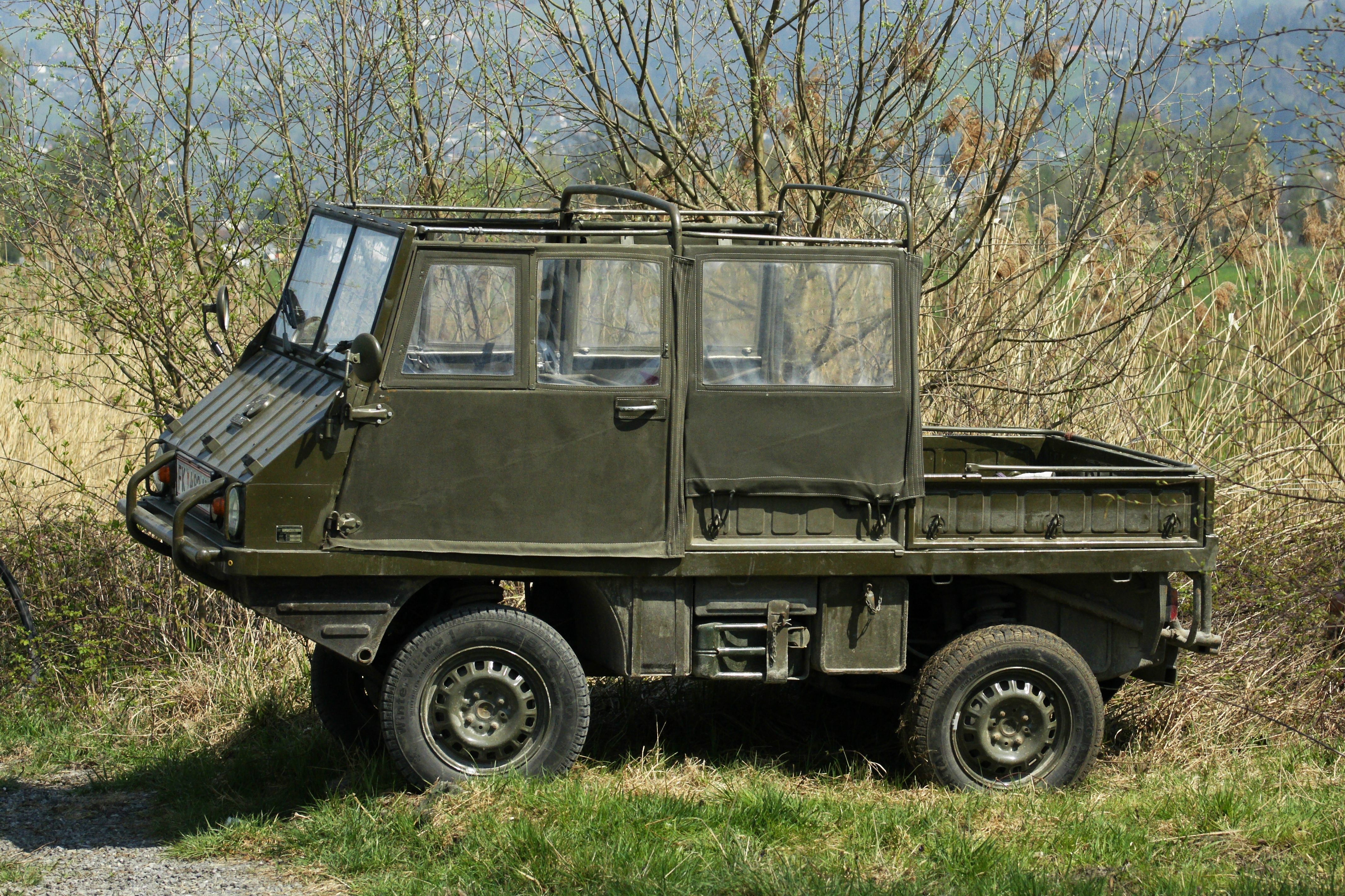 Der Haflinger ist ein kleiner, leichter Geländewagen der österreichischen Firma Steyr-Daimler-Puch AG. Er wurde von 1959 bis 1974 produziert und vorwiegend an das Österreichische Bundesheer und an die Schweizer Armee geliefert. *** Gesehen in Hohenems.